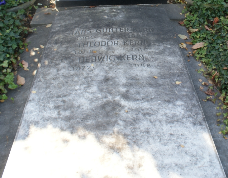 Hans Kern-Friedhof Döbling (27-1A)